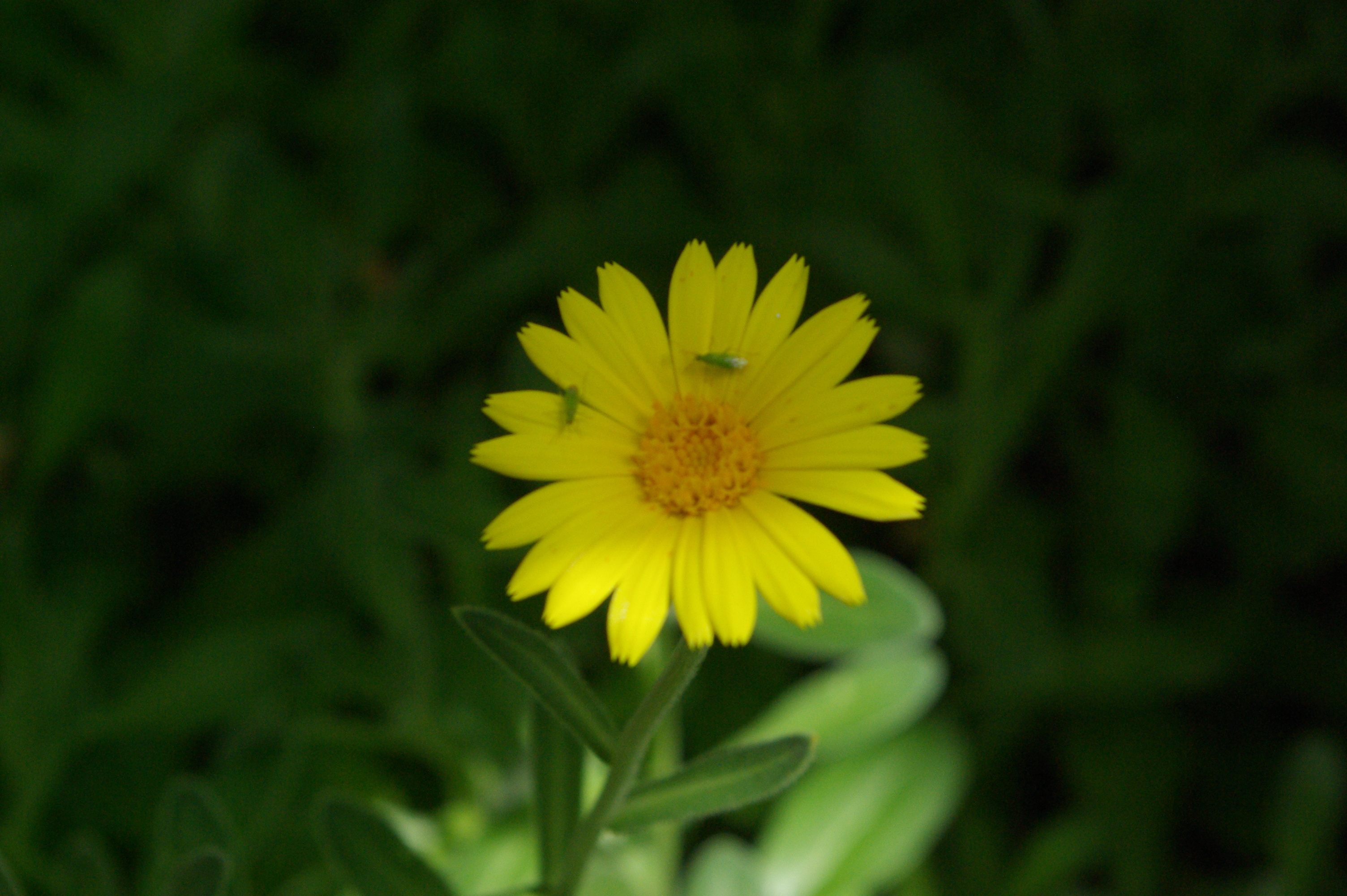 Calendula maritima, Conservatoire botanique national de Brest